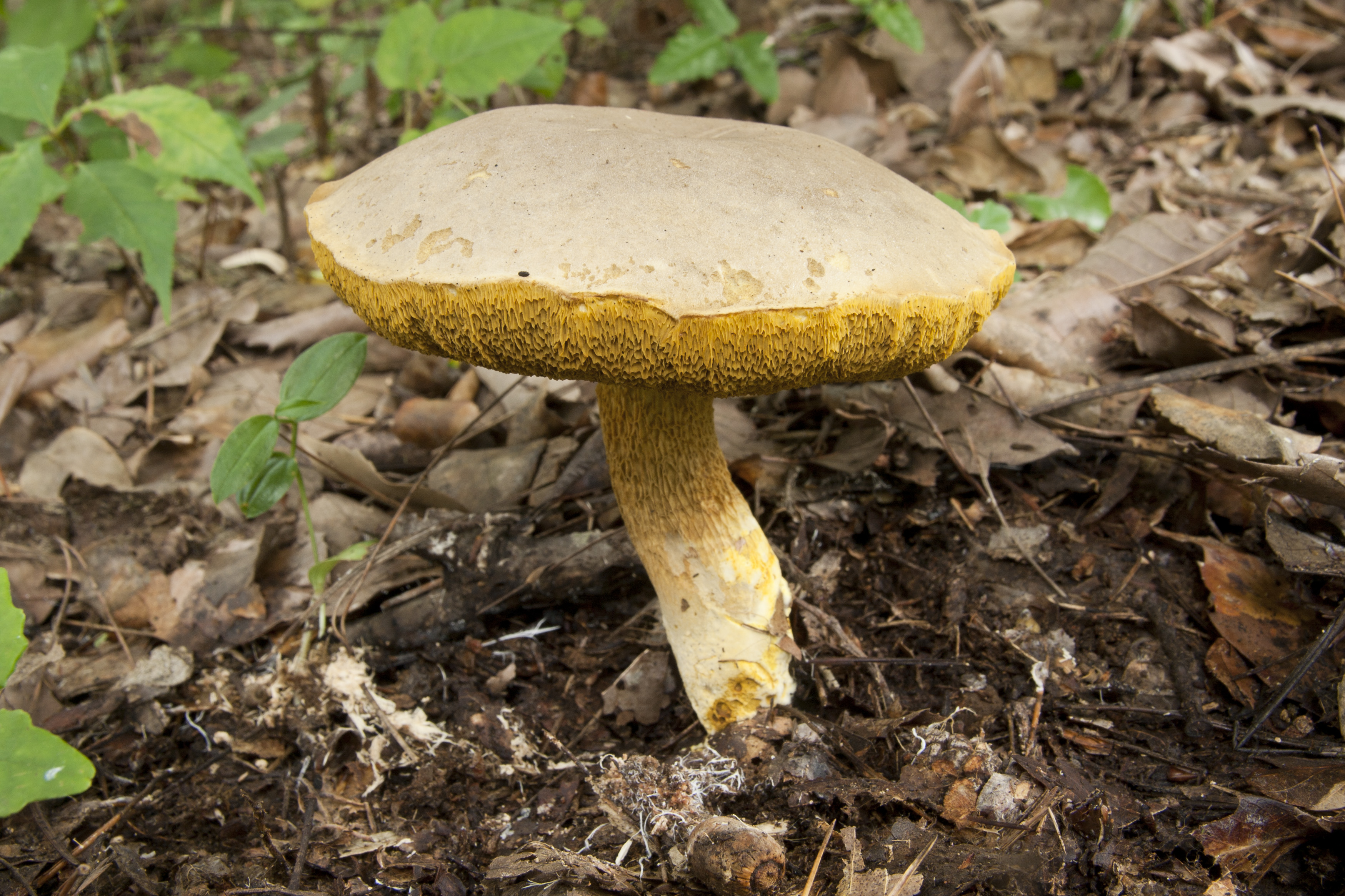 キアミアシイグチ属 キアミアシイグチ (学名:Retiboletus ornatipes)